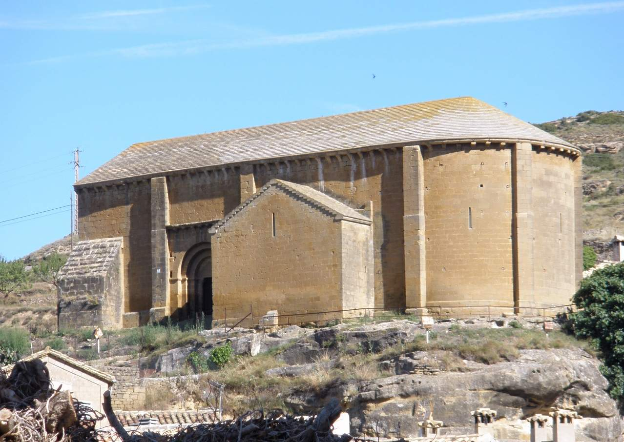 Iglesia de San Juan y necrópolis rupestre (Uncastillo, Zaragoza)